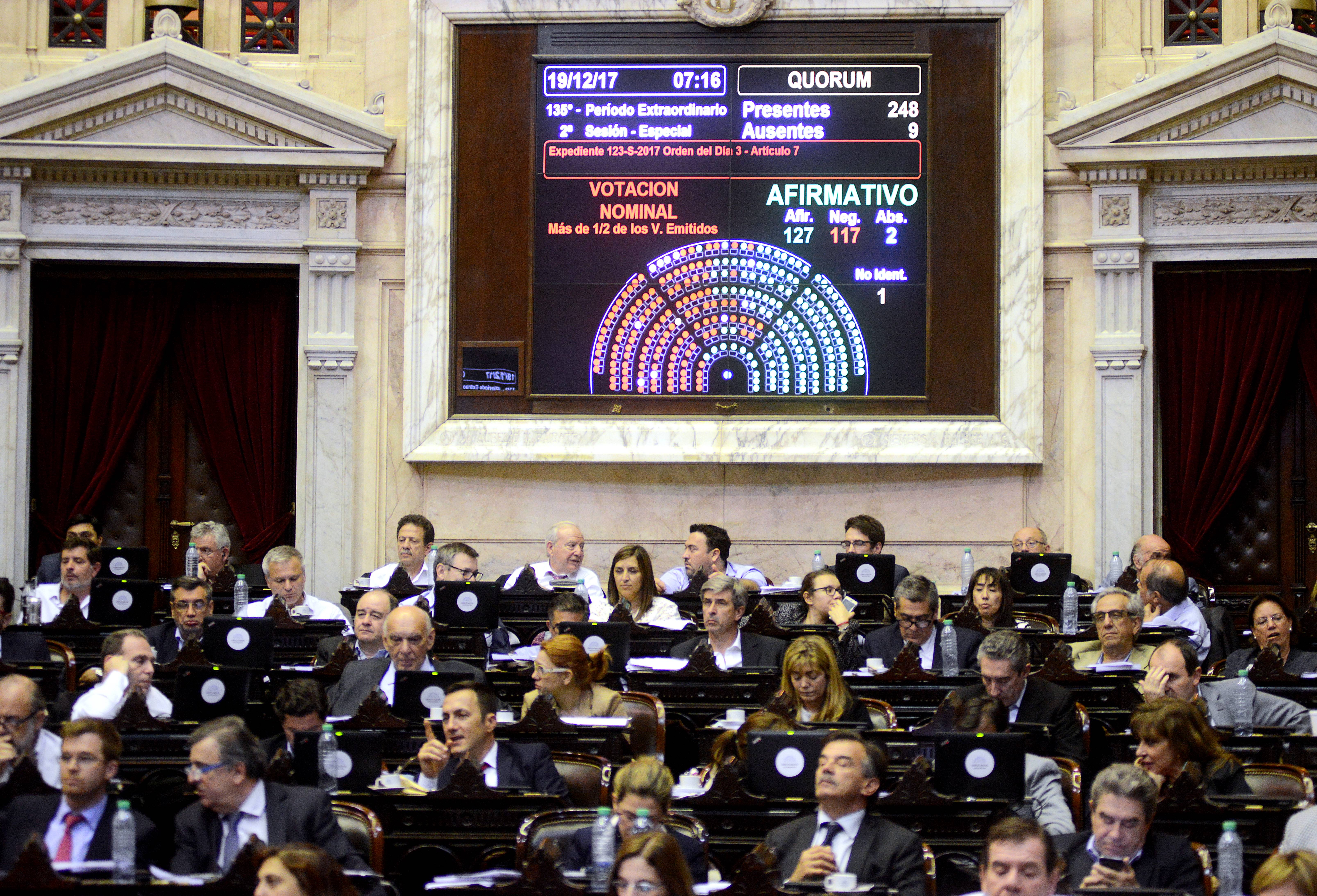 En el marco del periodo de sesiones extraordinarias, la Cámara de Diputados de la Nación aprobó por 127 votos afirmativos, contra 117 negativos y 2 abstenciones, el proyecto de reforma previsional impulsado por el Poder Ejecutivo. El proyecto de reforma previsional fue impulsado por el Poder Ejecutivo Contempla una modificación de la fórmula que se aplica para la actualización de las jubilaciones y establece –entre otras modificaciones- plazos trimestrales, en lugar de semestrales, para actualizar los haberes. El debate duró doce horas: comenzó apenas pasadas las 19 del lunes y finalizó a las 7 de la mañana del martes. La sesión especial se había iniciado, con quórum de 130 diputados, exactamente a las 14:12.